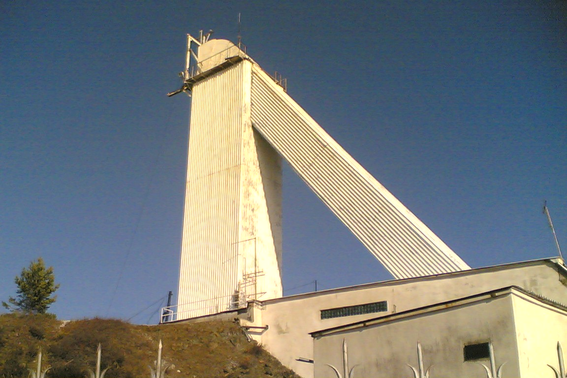 Большой Солнечный Вакуумный Телескоп (БСВТ), расположенный в Байкальской обсерватории (п Россия, Иркутская обл, п.Листвянка)